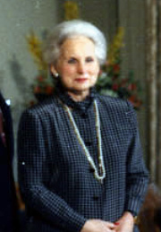 Jeanne Sauvé